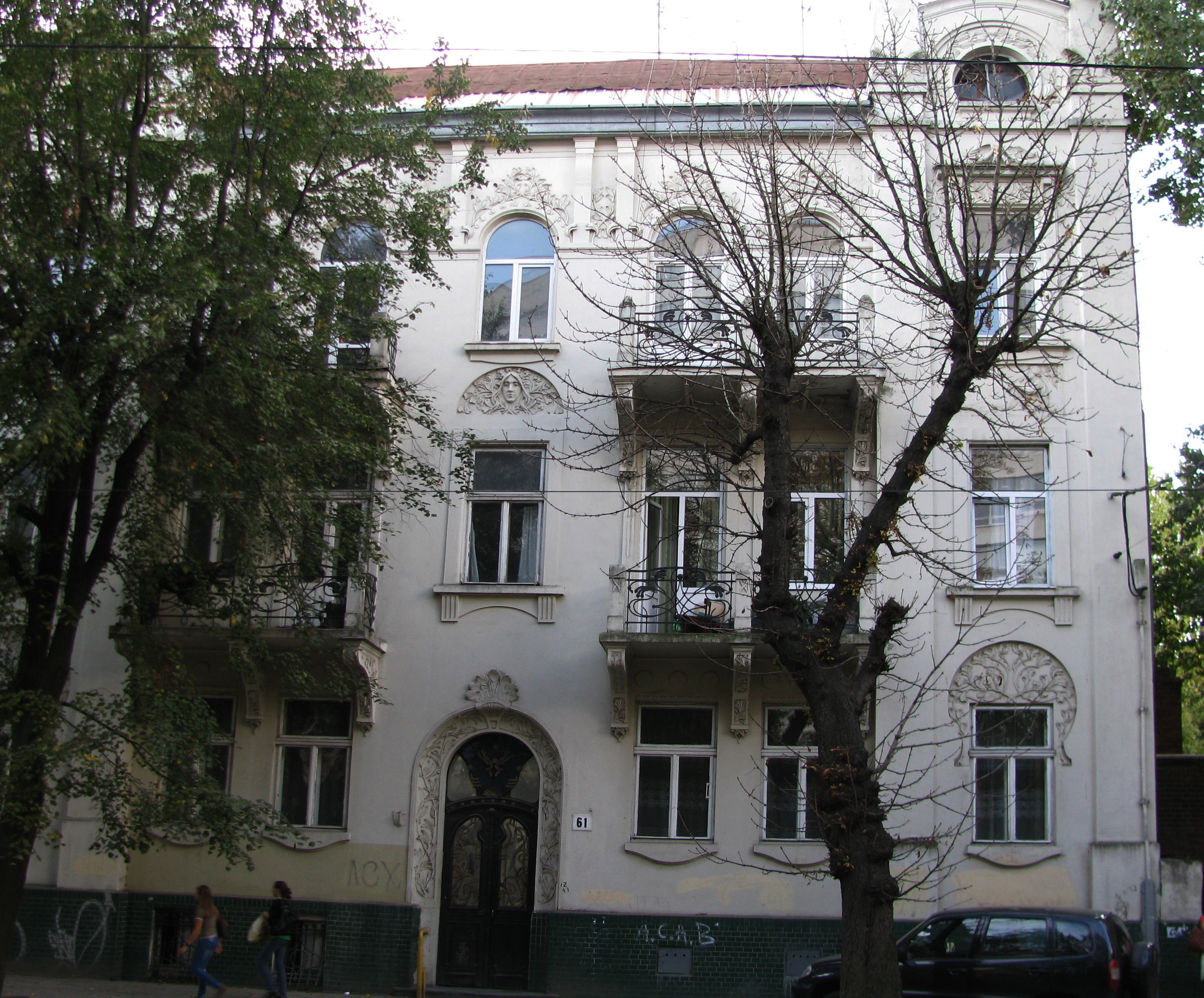 Будинок №61 на вулиці Бандери у Львові. Фасад.